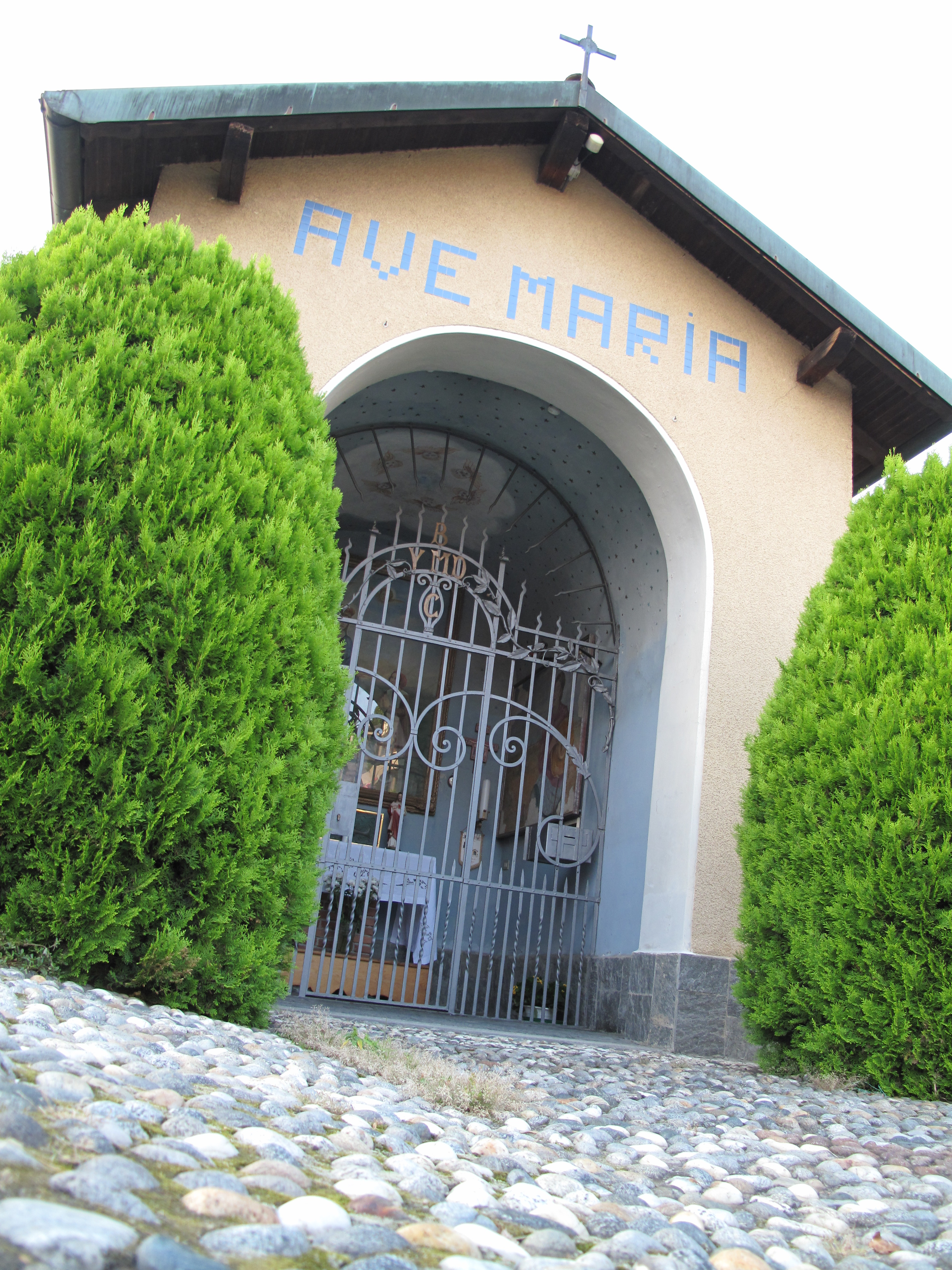 Cappella della Madonna di Caravaggio This is a photo of a monument which is part of cultural heritage of Italy.